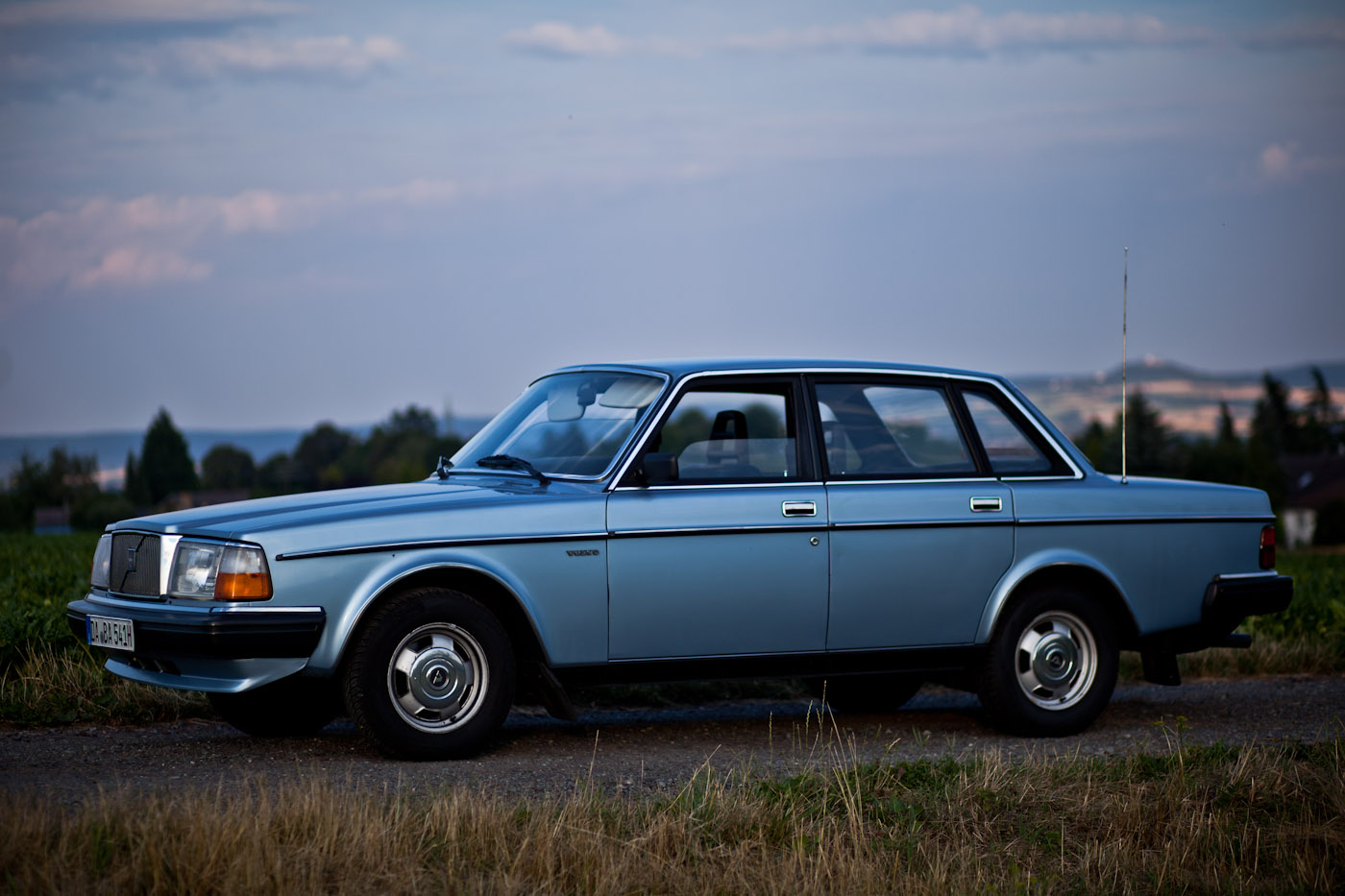 Volvo 264 GL Automatic (1981)